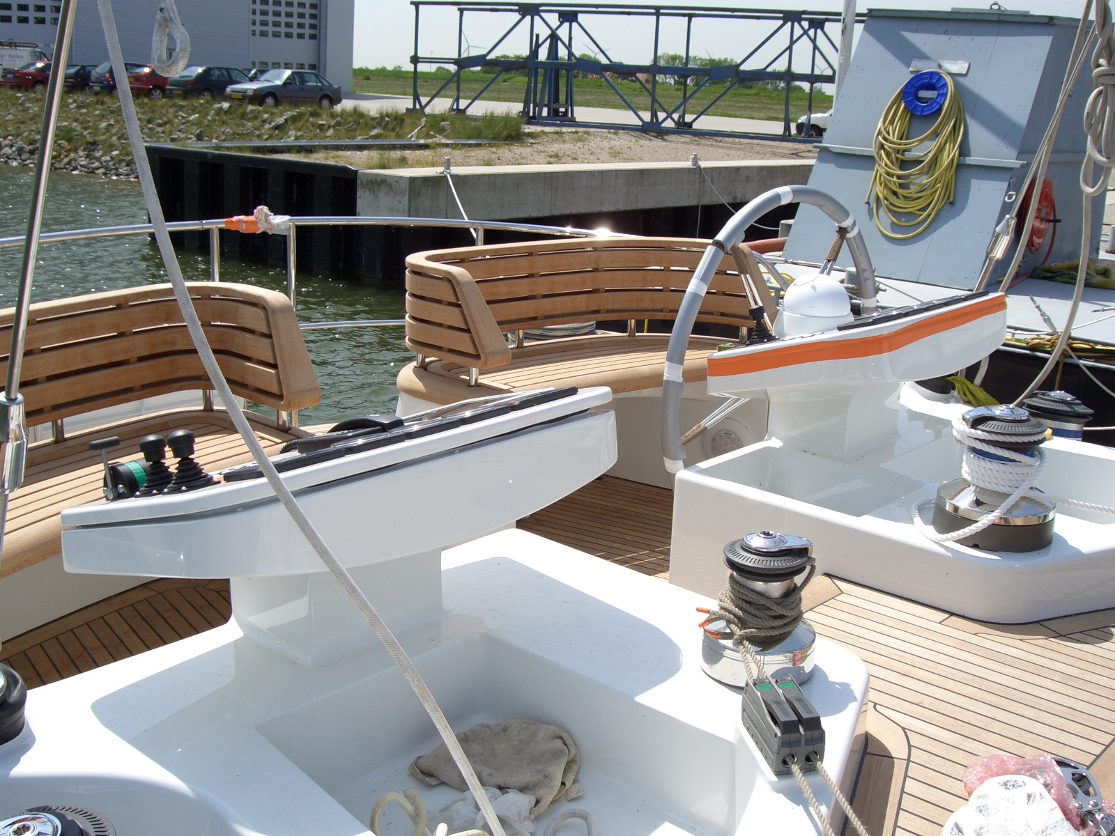 Fotograf: Seebeer Datum: 27.05.2005 Beschreibung: Ruderstand